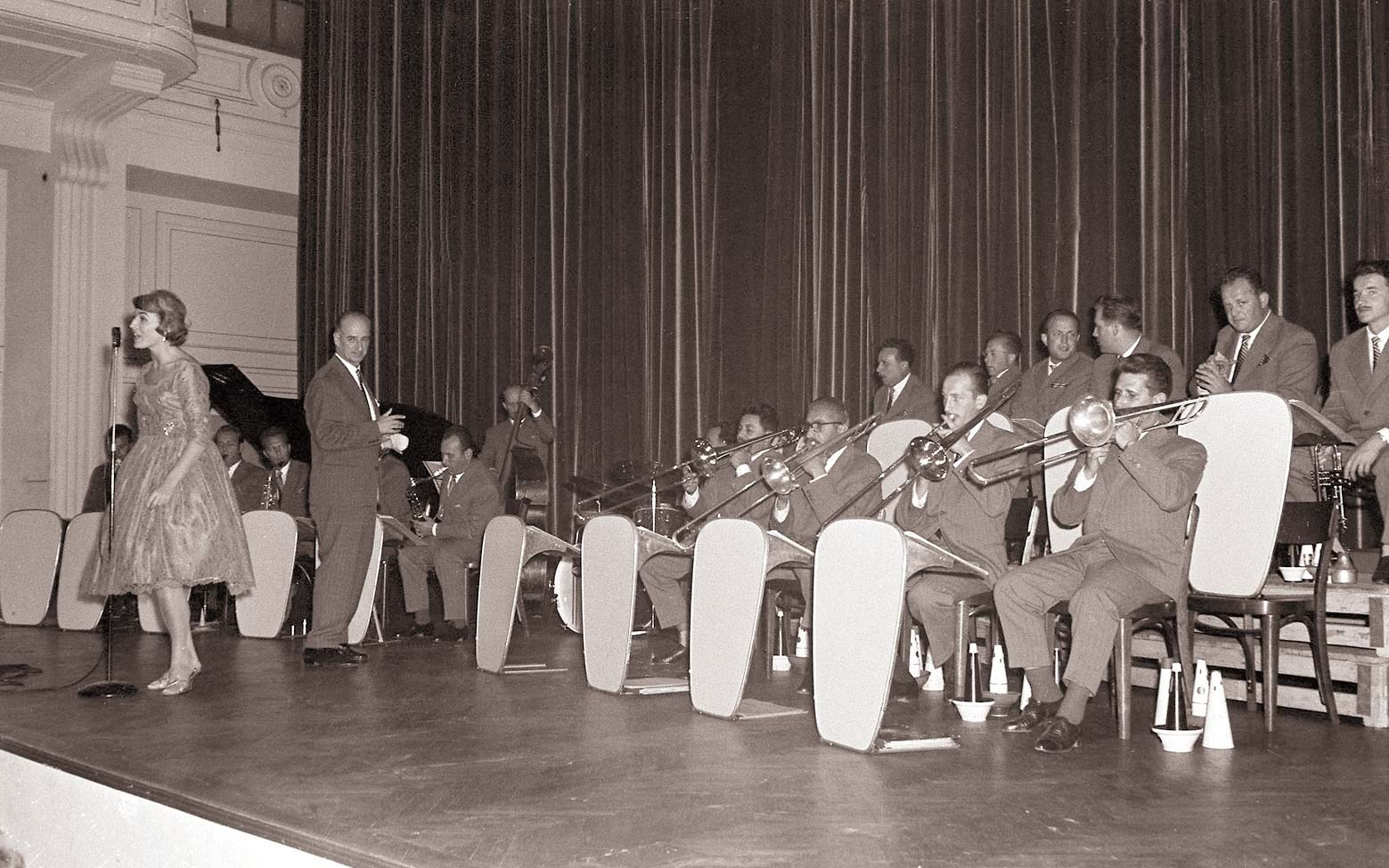 Koncert Bojana Adamiča v Unionski dvorani - poje Marjana Deržaj.